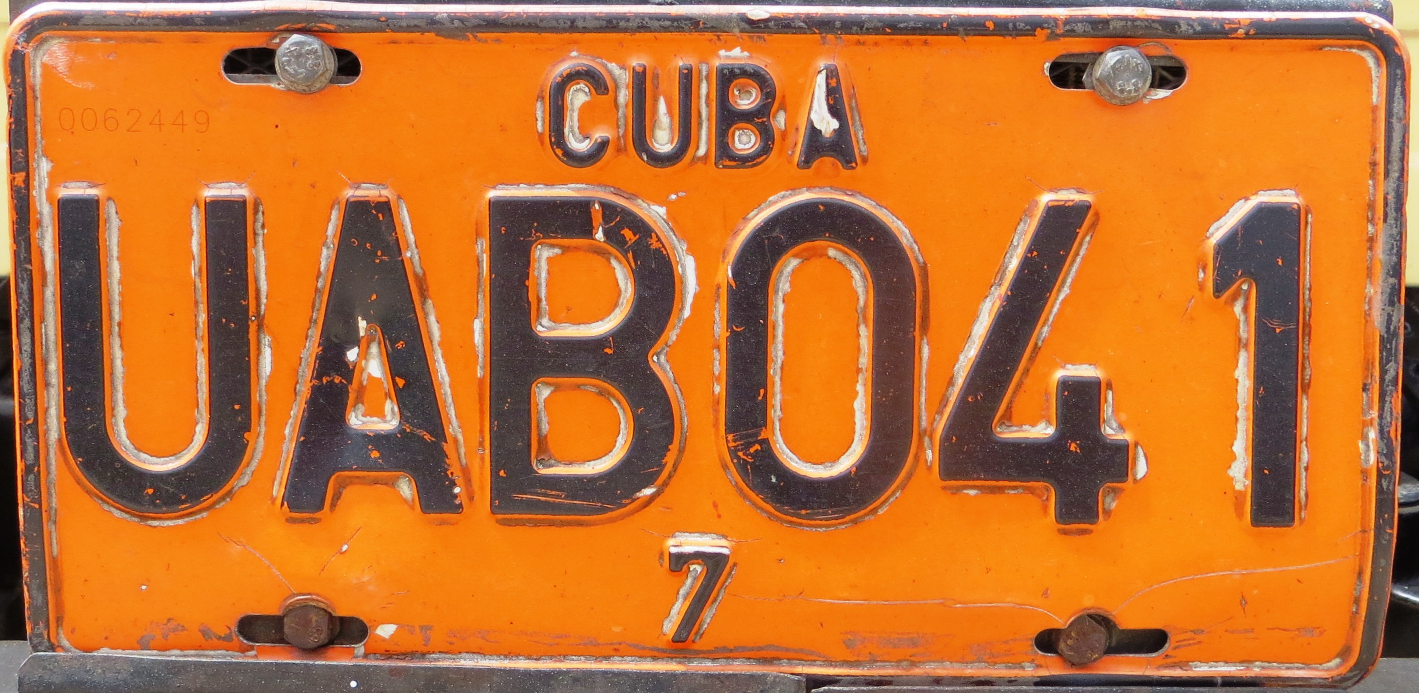 Kentekenplaat van Cuba